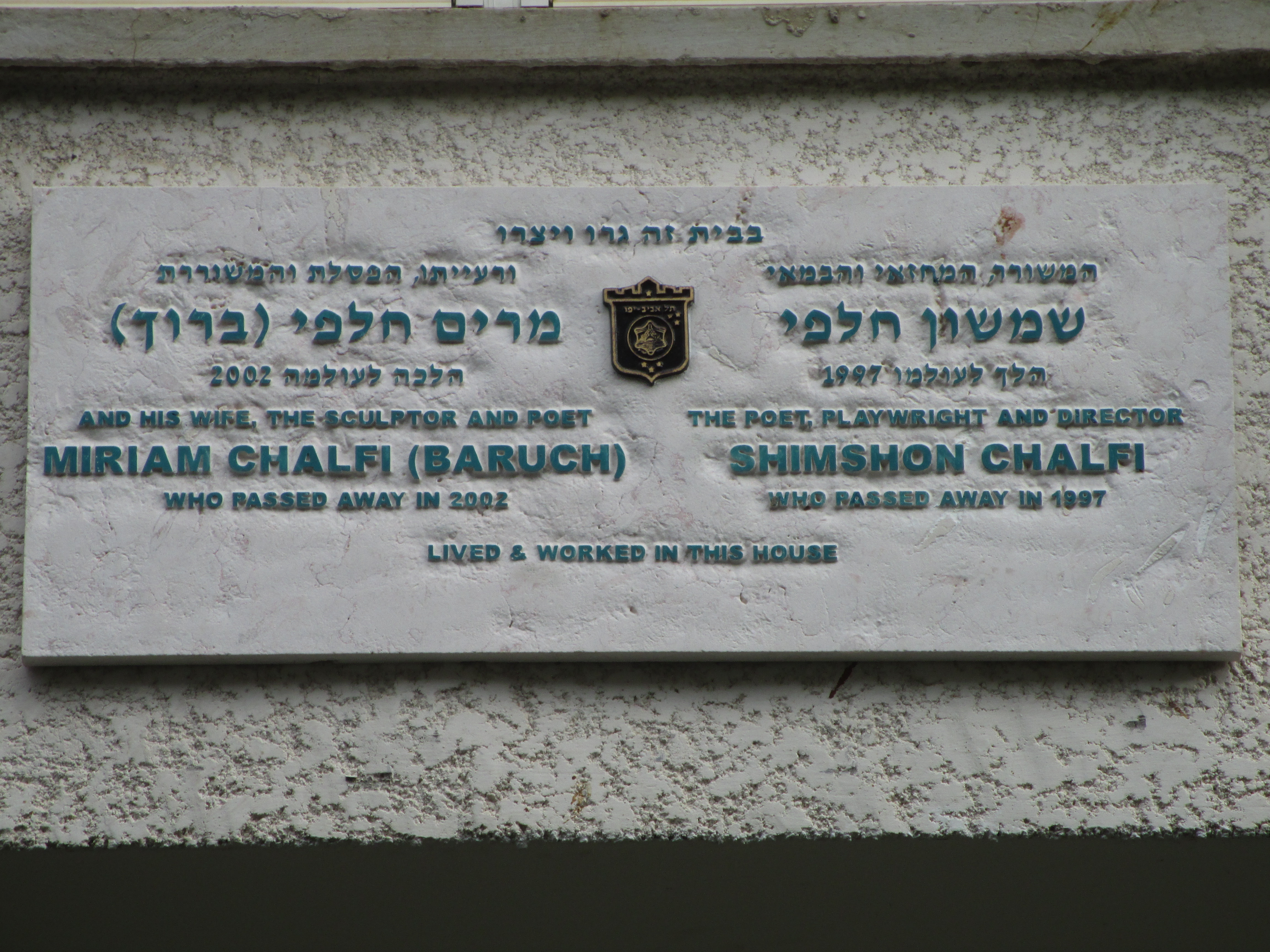 לוחית זיכרון לשמשון חלפי ומרים חלפי ברוך, על ביתם ברח' מאנה 23 בתל אביב